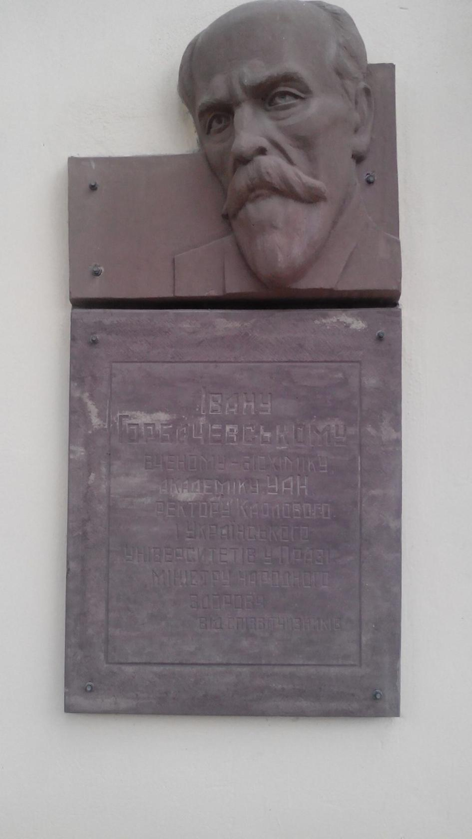 Музей-садиба Івана Горбачевського, вченого-лікаря, першого міністра охорони здоров'я Австро-Угорщини, село Зарубинці